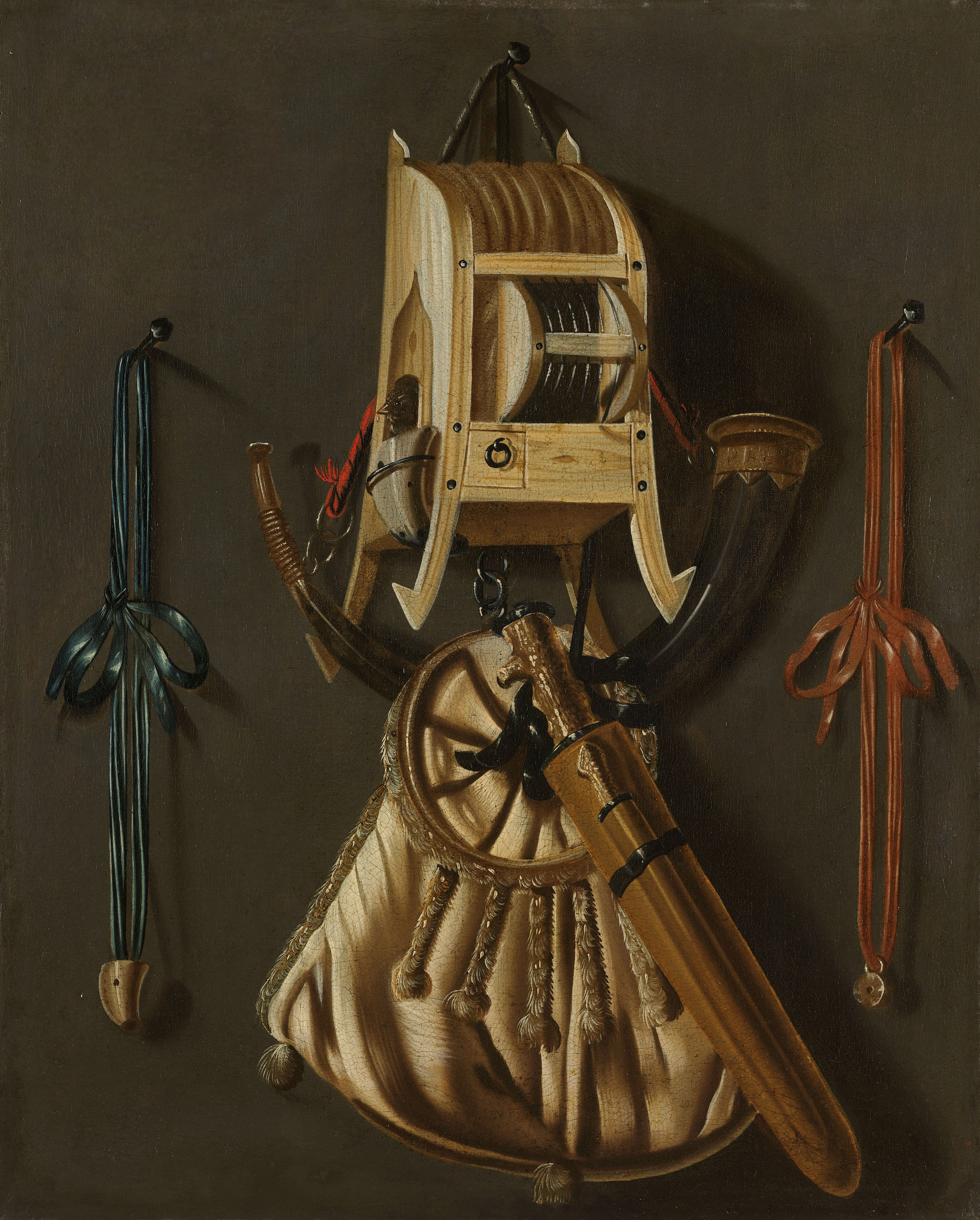 Stilleven met jachtgerei. Trompe-l'oeil met een vogelkooitje en verschillende objecten gebruikt bij de jacht (weitas, jachthoorn, dolk) hangend tegen een muur.